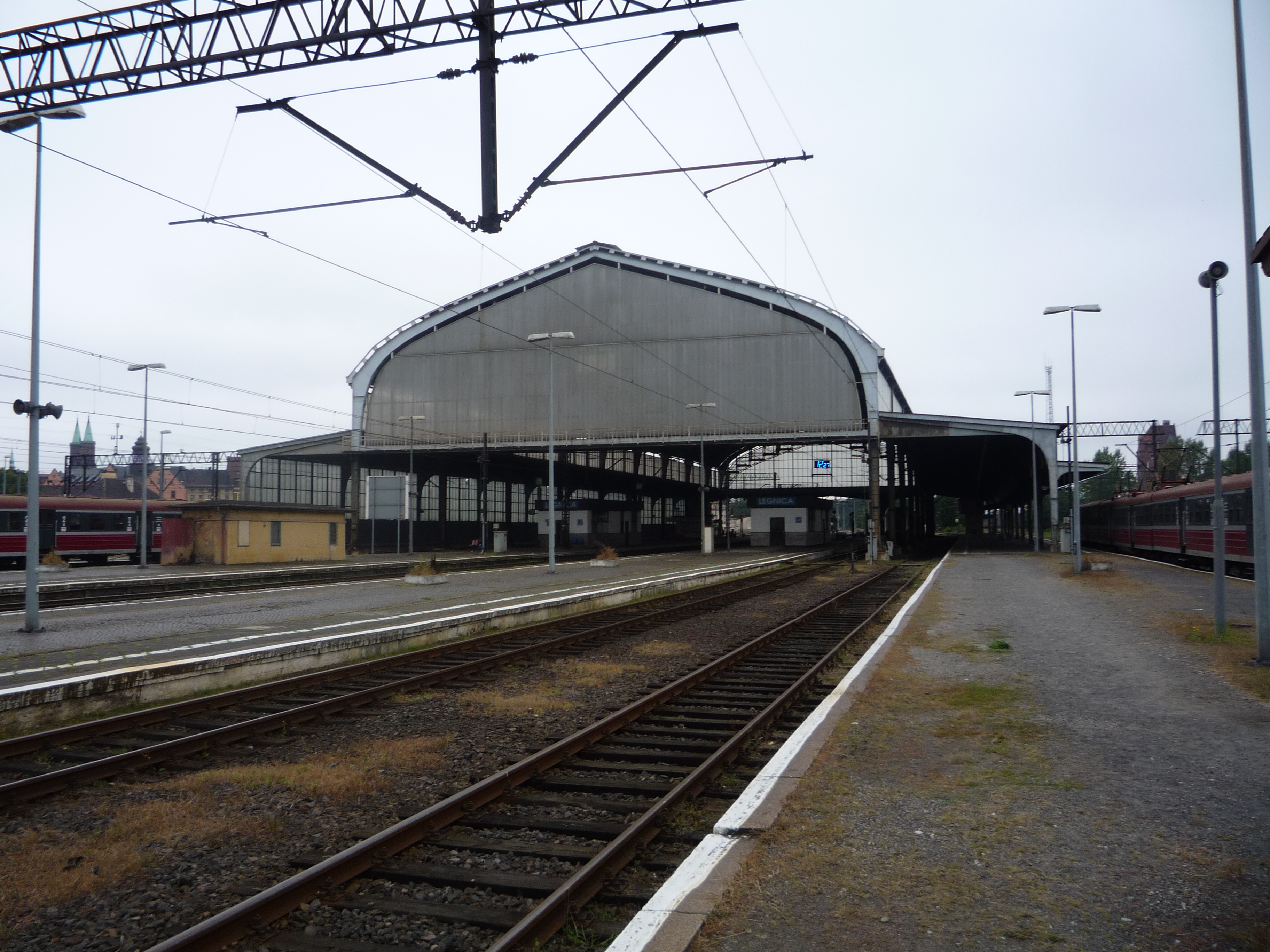 Hala peronowa głównego dworca kolejowego w Legnicy